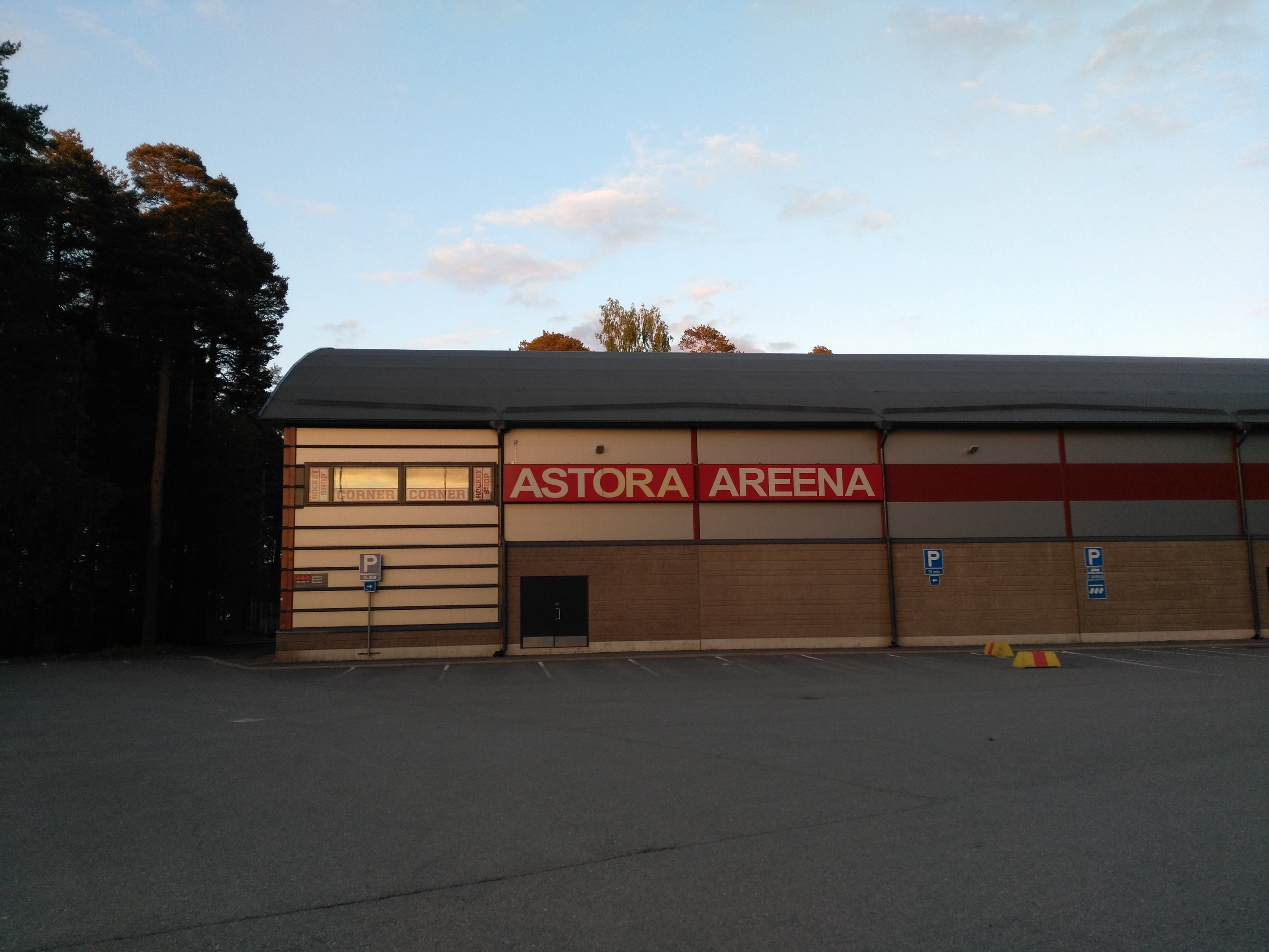 Astora Areena (sivu)